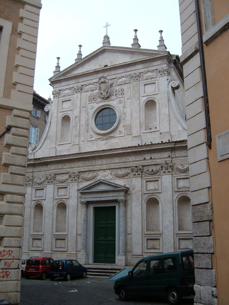 Chiesa di Santa Caterina dei Funari, nel rione Sant'Angelo a Roma. Foto personale.